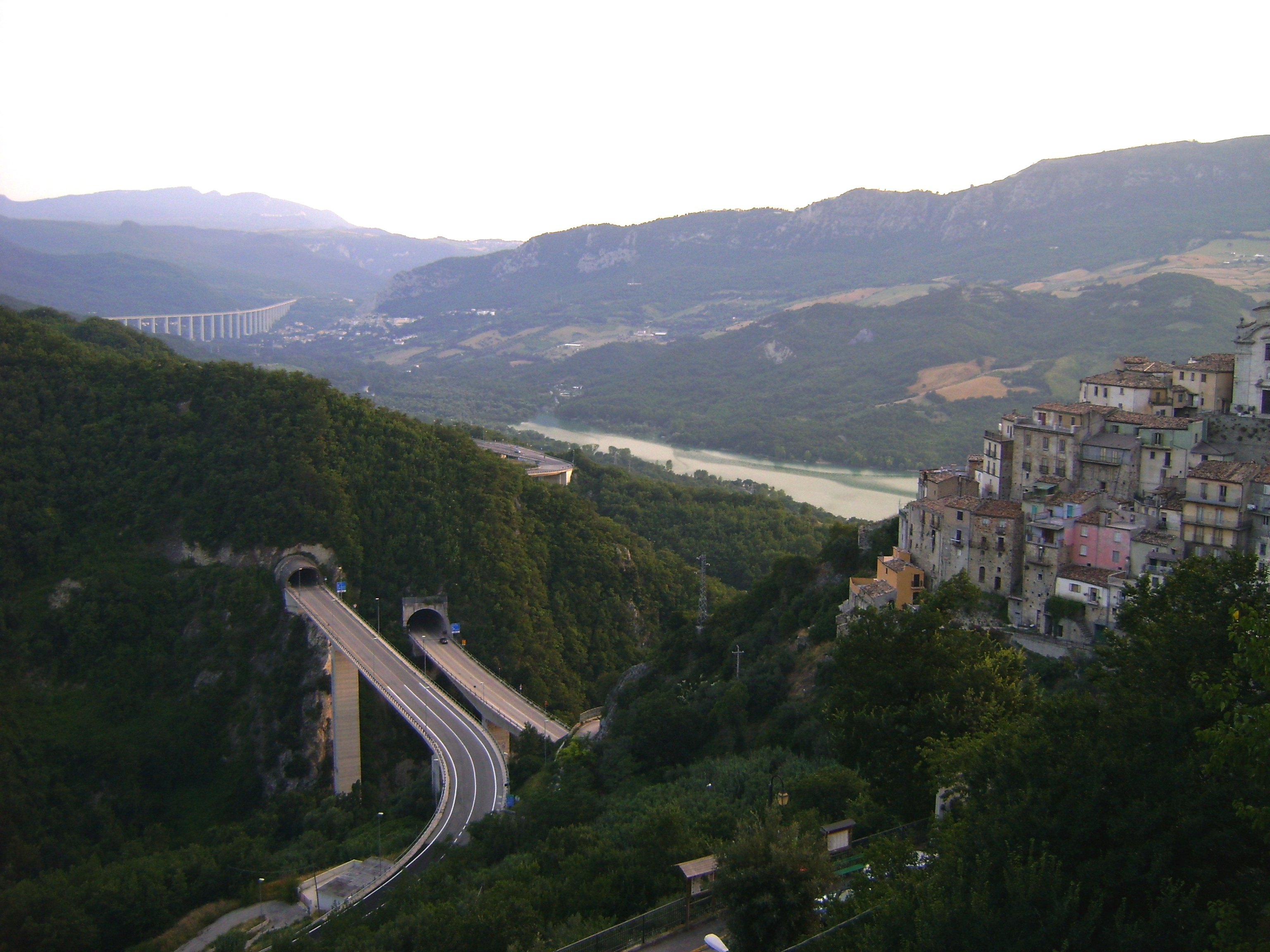 Veduta della Val di Sangro tra Colledimezzo e Villa Santa Maria, con il lago di Bomba e la SS 652.